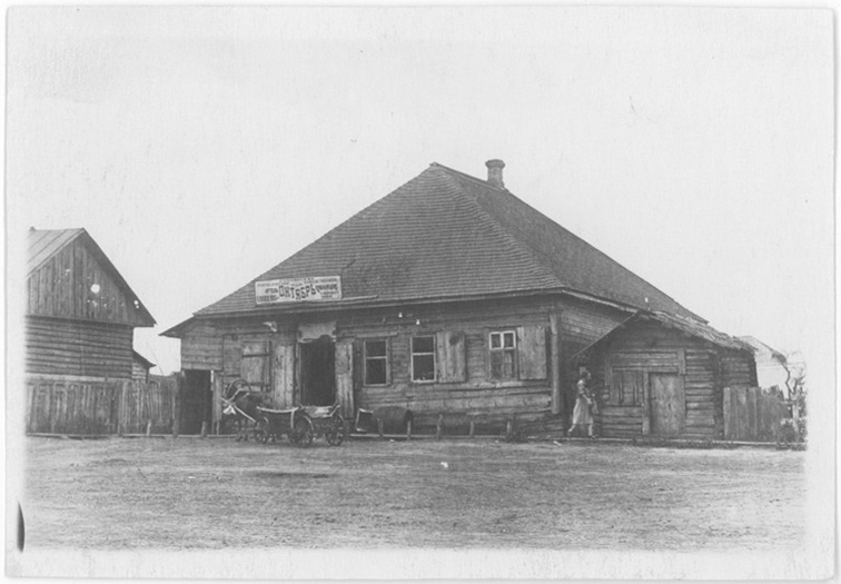 Беларуская (тарашкевіца): Хвойнікі (Chvojniki), пляц Рынак (plac Rynak). Местачковы дом